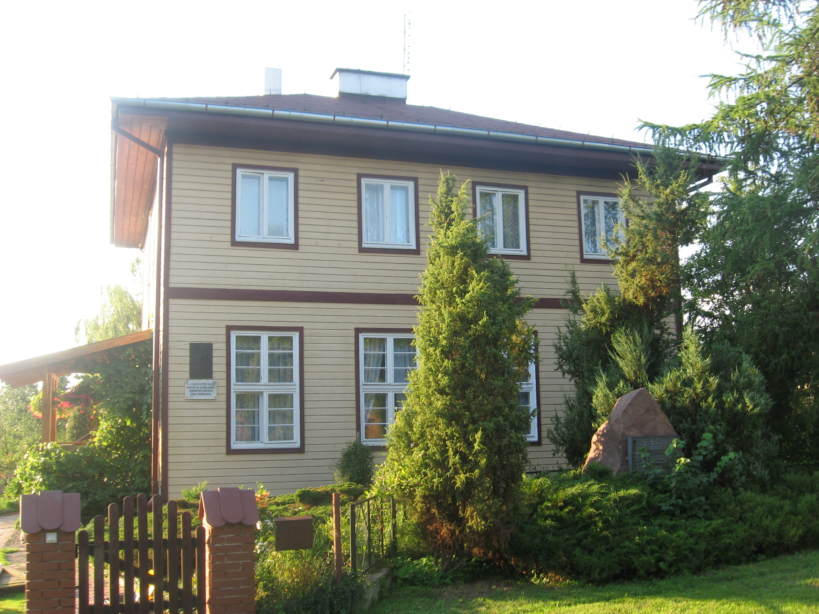 Budynek szkoly polskiej w Unieszewie - stan obecny